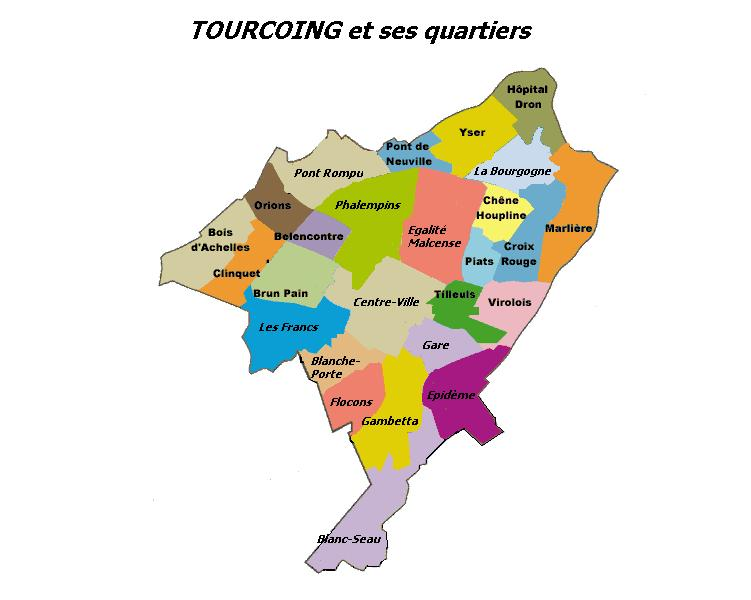 plan de Tourcoing et de ses quartiers